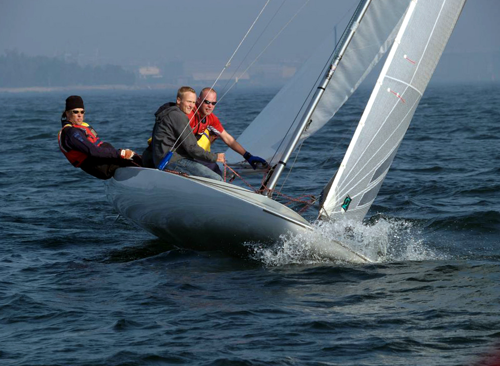 E Scow, purjehduskilpailu, Suomen Urheiluveneliitto, Helsinki